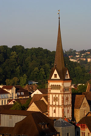 Münster in Schaffhausen (Nr. 03.1-5191)